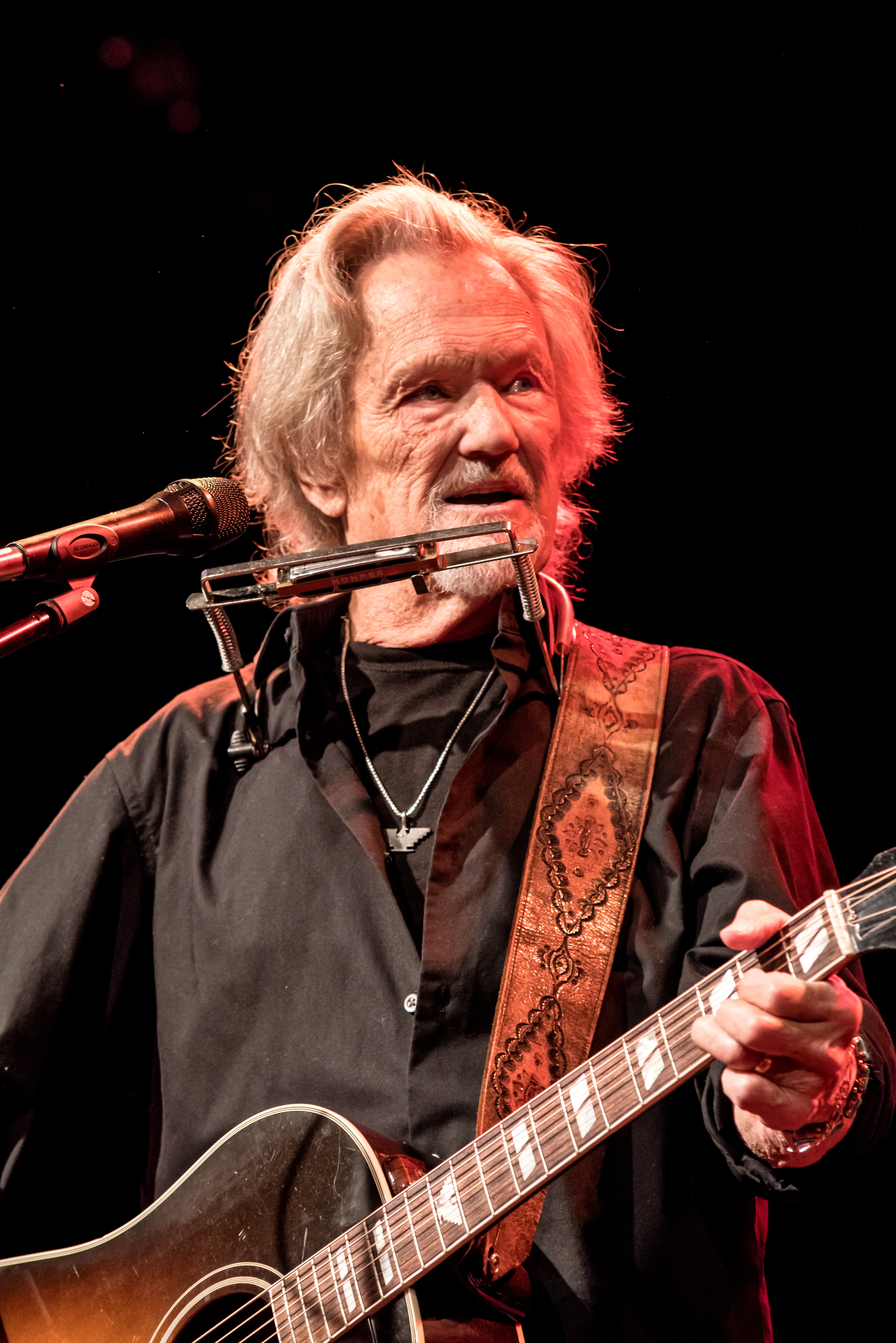 Bilder vom Zelt Musik Festival 2017 in Freiburg im Breisgau Kris Kristofferson